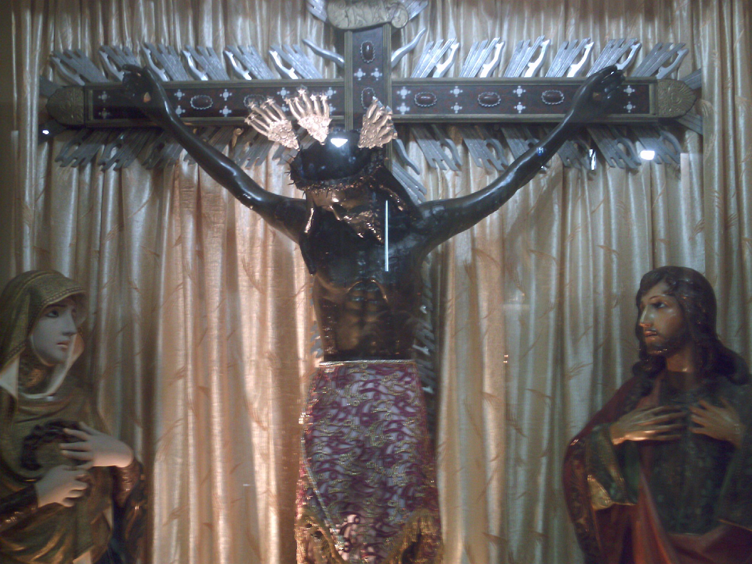 El Cristo Negro de San Alfonzo o Santa Reliquia de Gibraltar o Santo Cristo de Maracaibo, es una talla española localizada en la iglesia San Alfonzo de Maracaibo perteneciente inicialmente al poblado de San Antonio de Gibraltar, Venezuela.